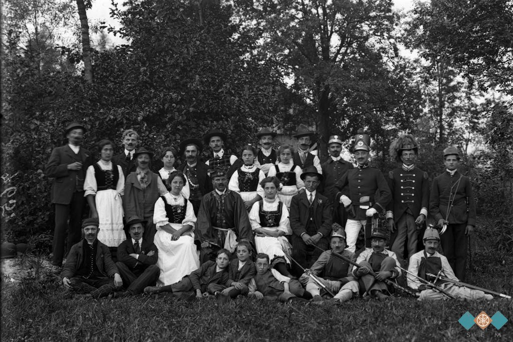 Igralci igre Naša kri v Šmarci.